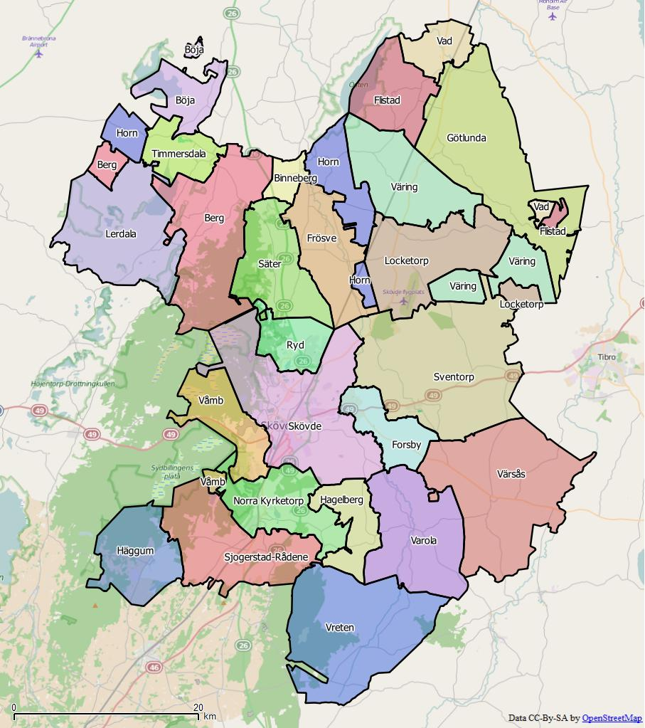 Distriktsindelningen i Skurups kommun World file: 76.99029092898160798 0 0 -76.99029092898160798 1510929.40180420456454158 8095641.0367128336802125